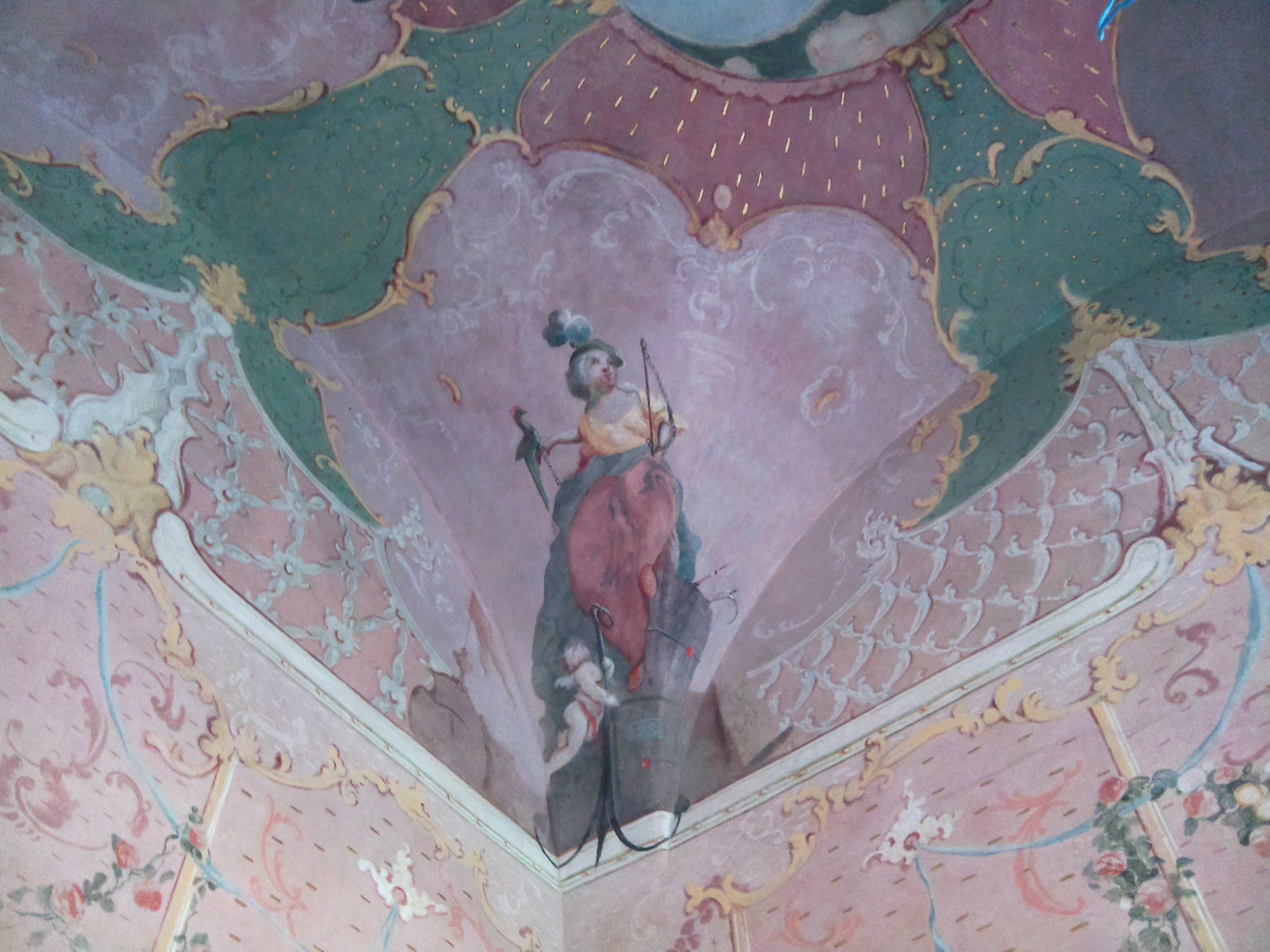 L’Huillier-Coburg-kastély freskói This is a photo of a monument in Hungary. Identifier: 2726